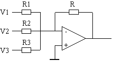 Schéma créé par Lucien Duval 1er mai 2006 à 16:49 (CEST)